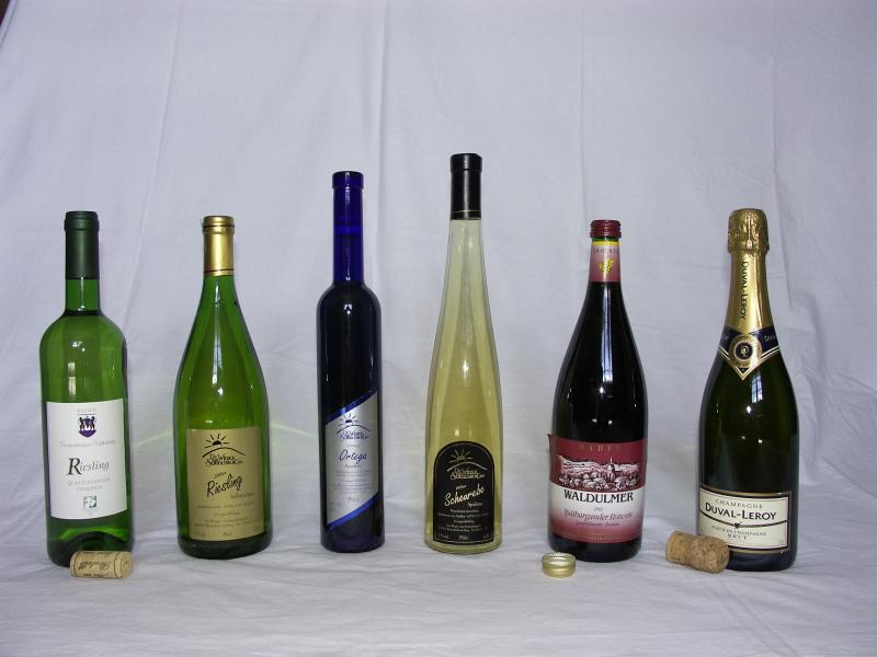 Sechs Weinflaschen und verschiedene Verschlüsse v.l.n.r: Weißwein, Riesling, 0,75 Liter, davor ein Korken Weißwein, Riesling, 1,00 Liter Weißwein, Orteaga, Spätlese, 0,5 Liter, blaues Glas Weißwein, Scheurebe, 0,75 Liter Rotwein, Spätburgunder, 1,00 Liter, davor Schraubverschluss Schaumwein, aus dem Gebiet Champagne, davor der spezial Korken Andere Versionen: keine